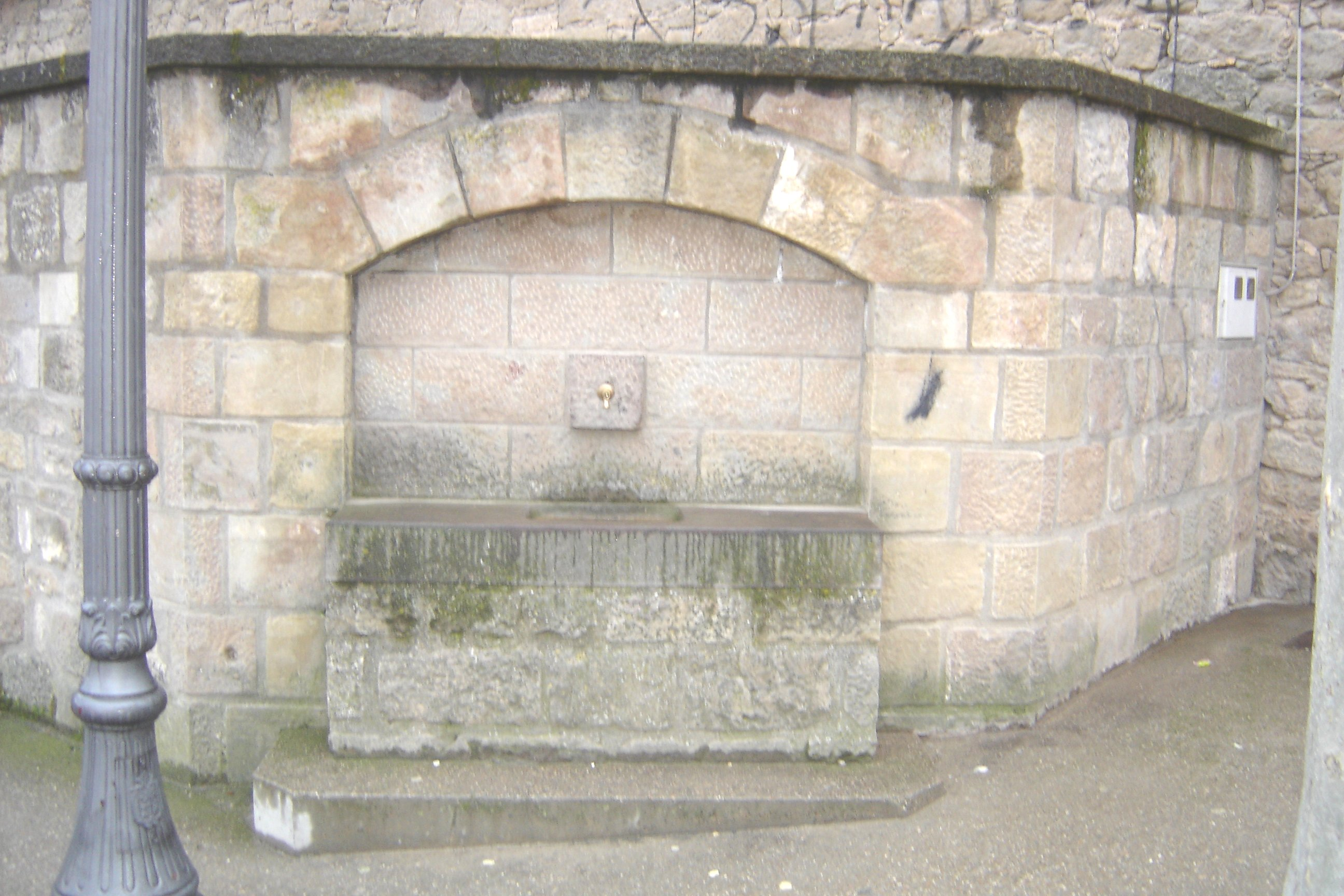 La font dels Safarejos, a Solsona, (Solsonès)